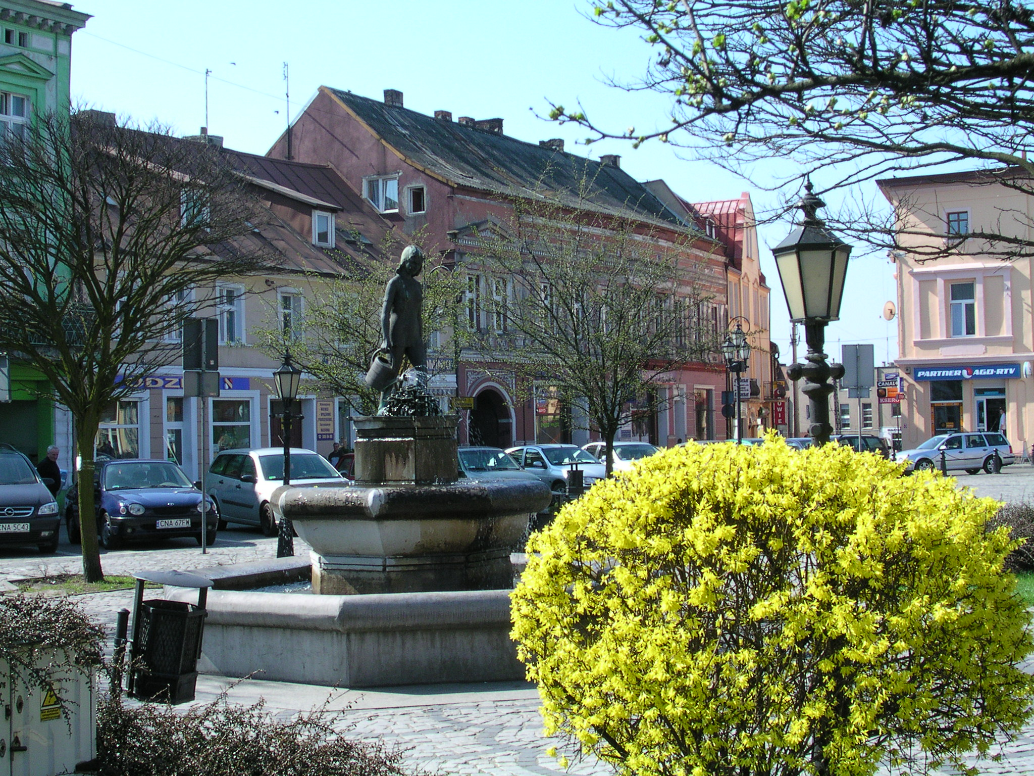 Rynek i fontanna